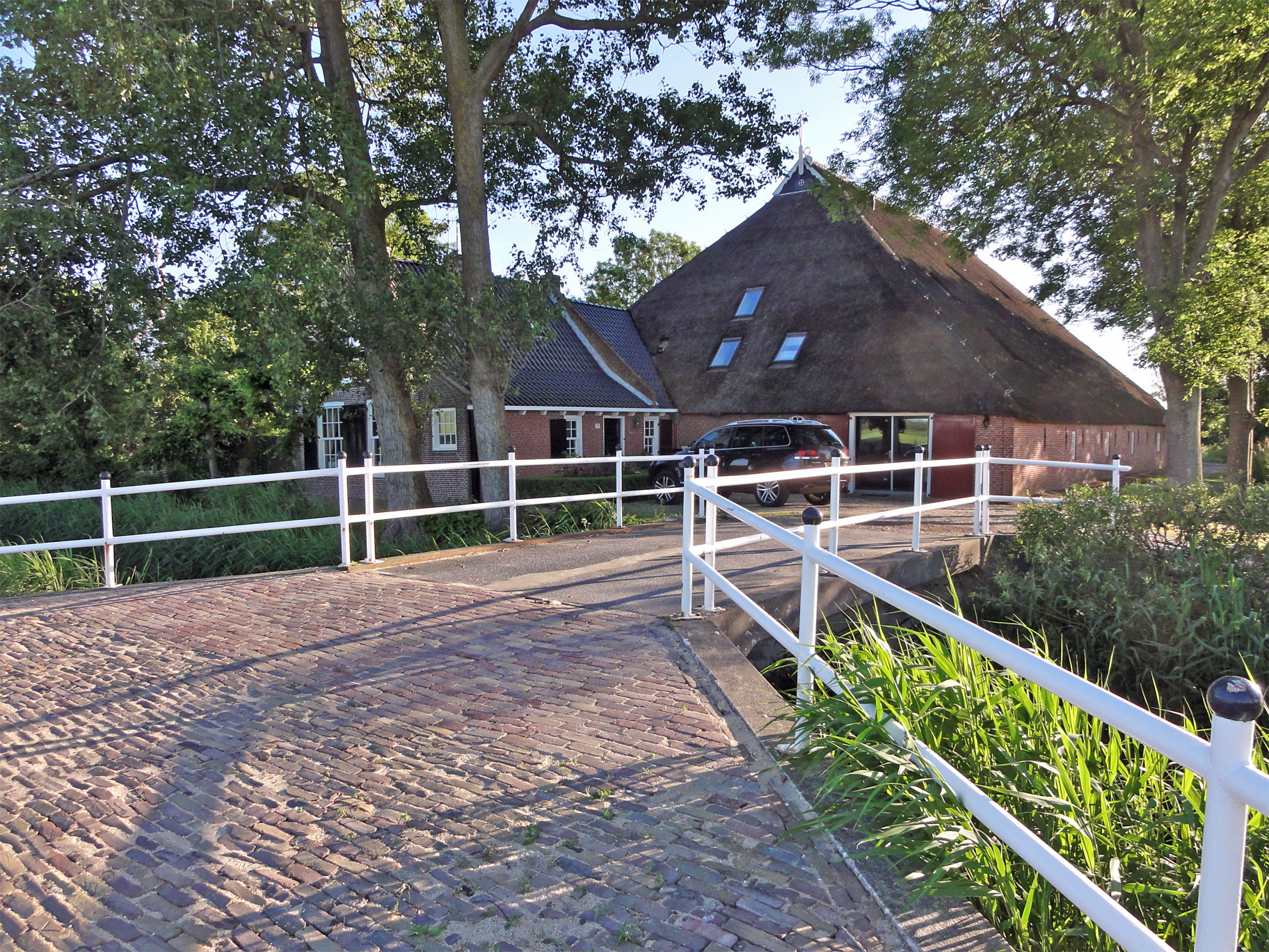 Stadhoudersweg 75 in Sint-Annaparochie